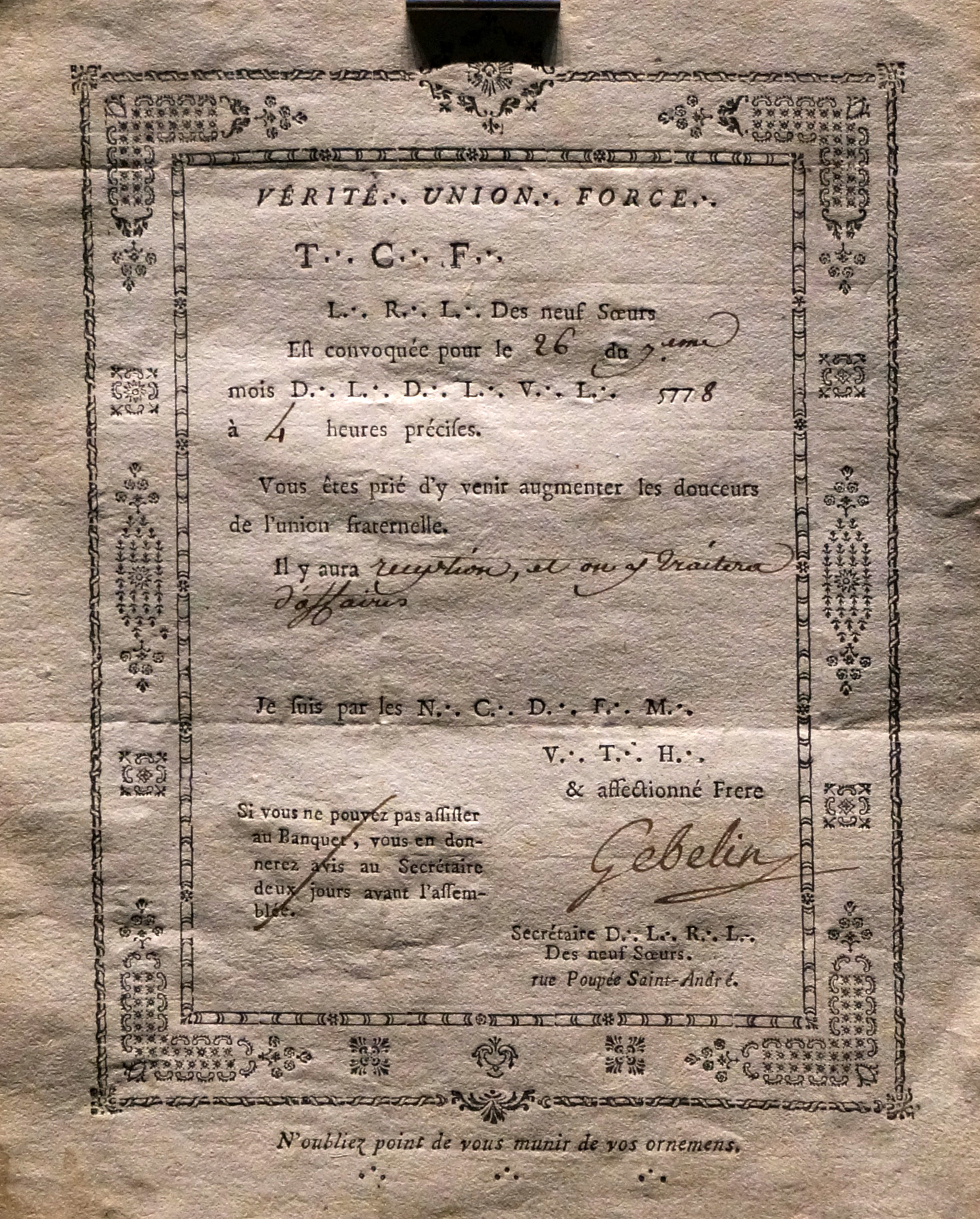 dans les Collections du Musée de la Franc-Maçonnerie.